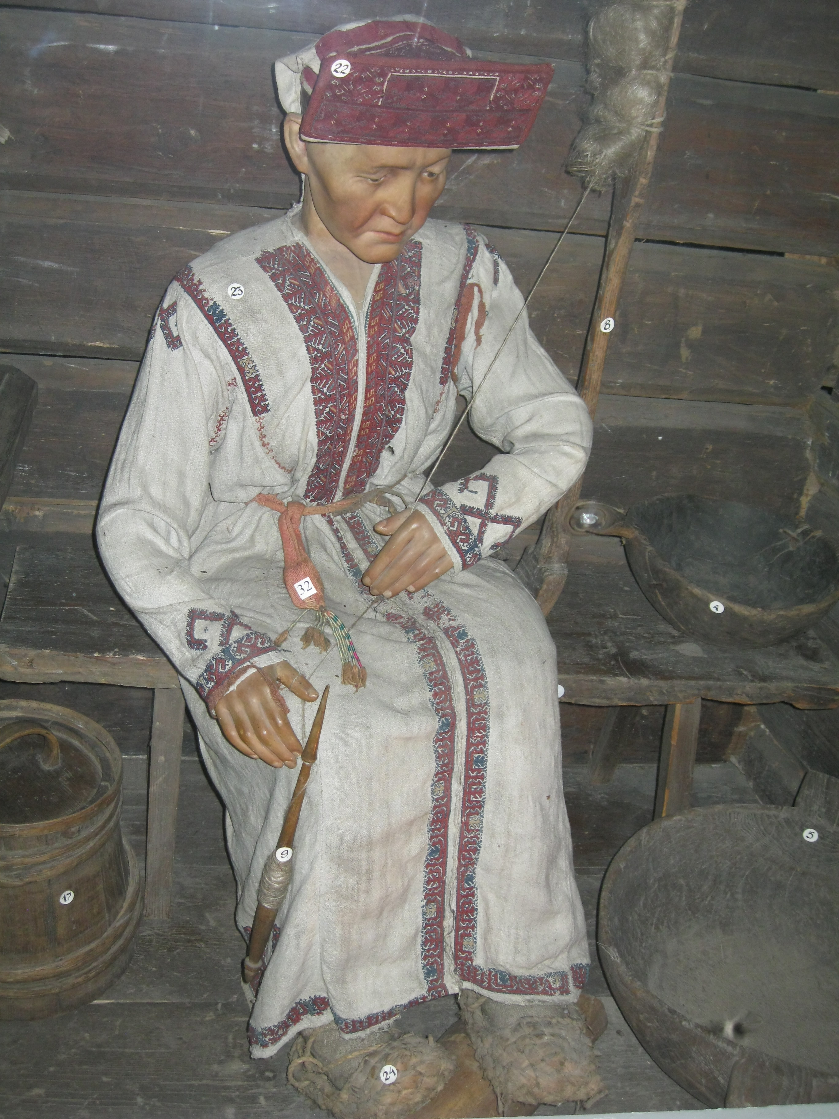 Женский национальный костюм северо-западных марийцев, XIX в. Фонды Яранского краеведческого музея, Яранск, Кировская область, Россия.